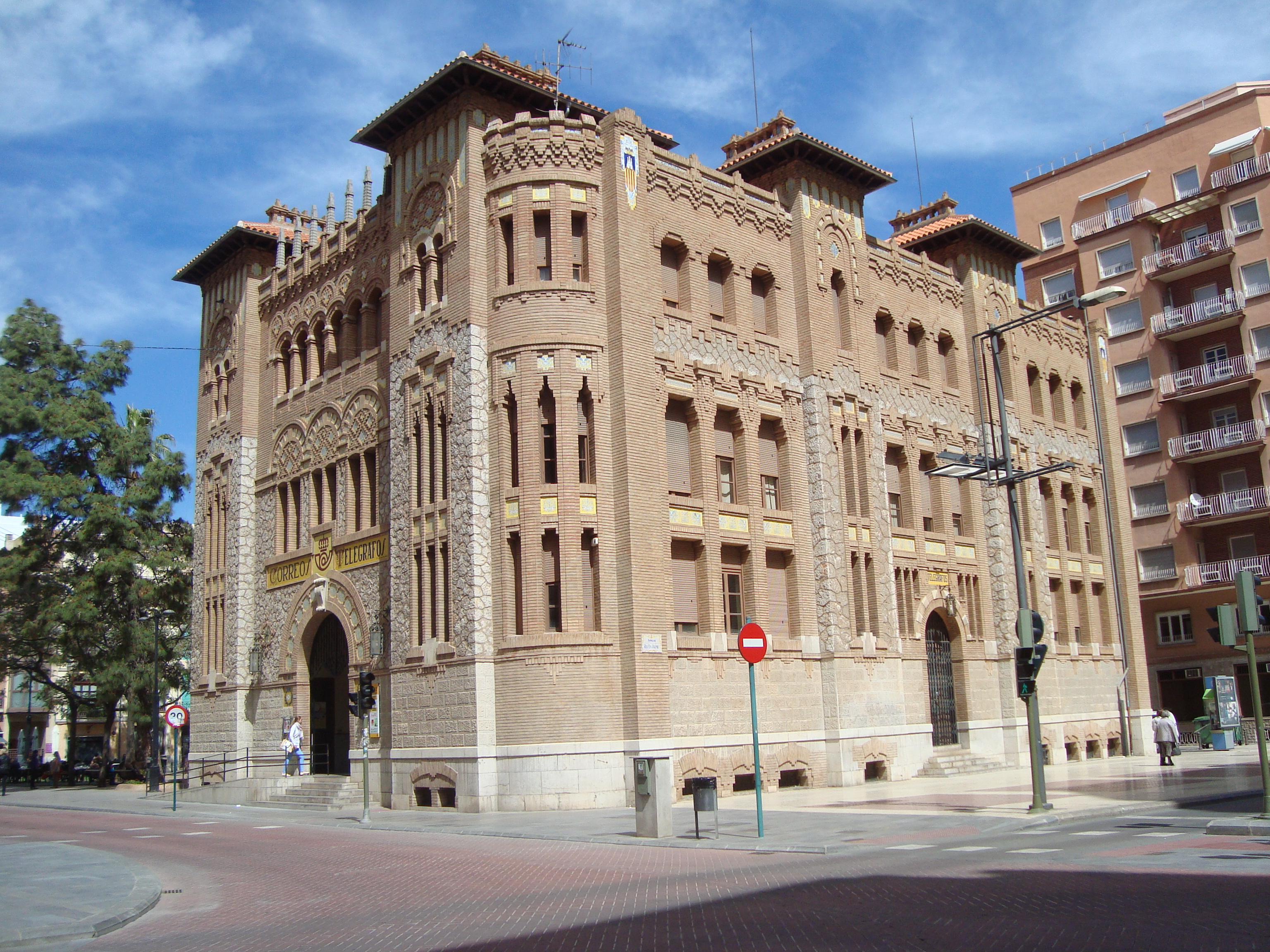 Edifici de Correus de Castelló de la Plana, contruit en l'any 1932